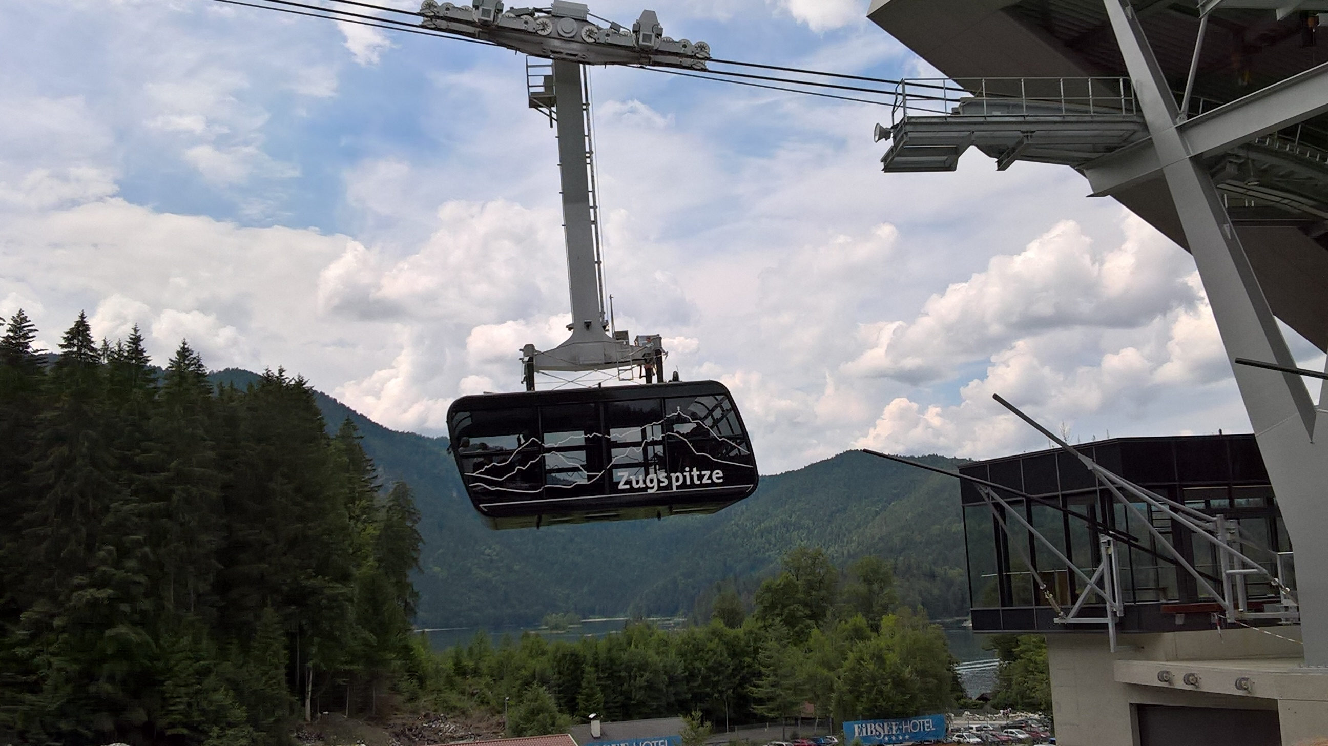 Fahrgastkabine vor der Talstation